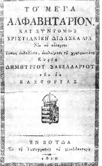 Εξώφυλλο βιβλίου το ΜΕΓΑ ΑΛΦΑΒΗΤΑΡΙΟΝ